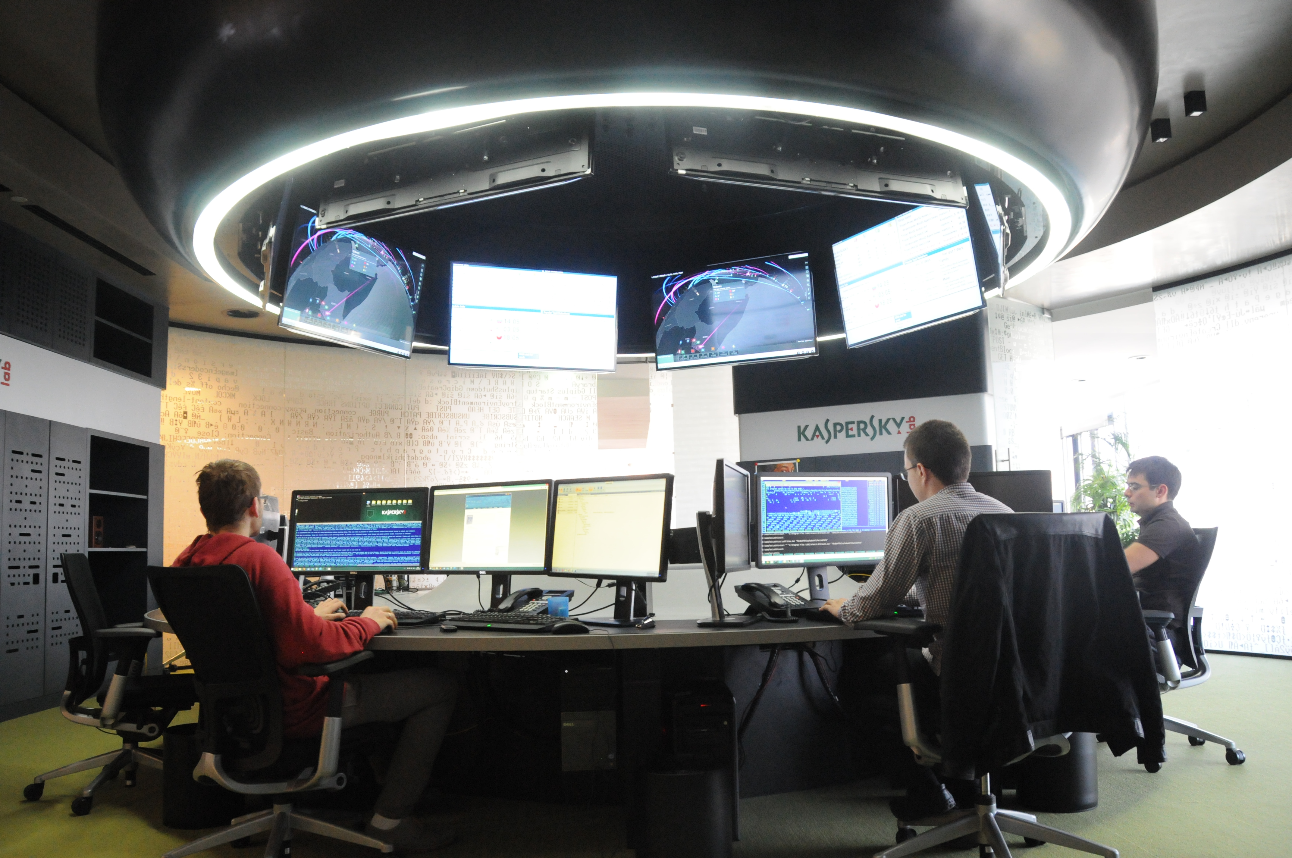 Kaspersky Lab. Вирусная лаборатория.